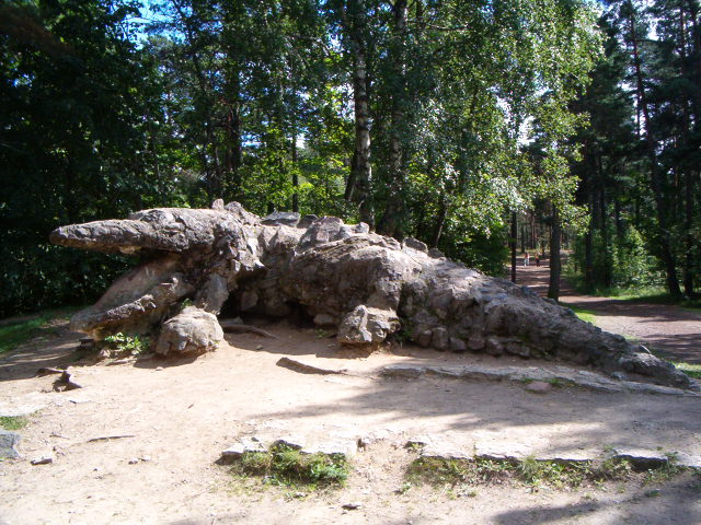 Skulptuur "Krokodill". Valmis aastal 1908. Skulptuur paikneb Glehni pargis, Tallinnas Nõmme linnaosas. Skulptuuri autor: Nikolai von Glehn (1841–1923)